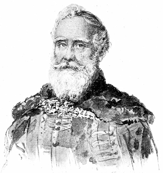 Perényi Zsigmond (1783–1849) politikus, az 1848–49-es szabadságharc vértanúja portréja. Barabás Miklós rajza